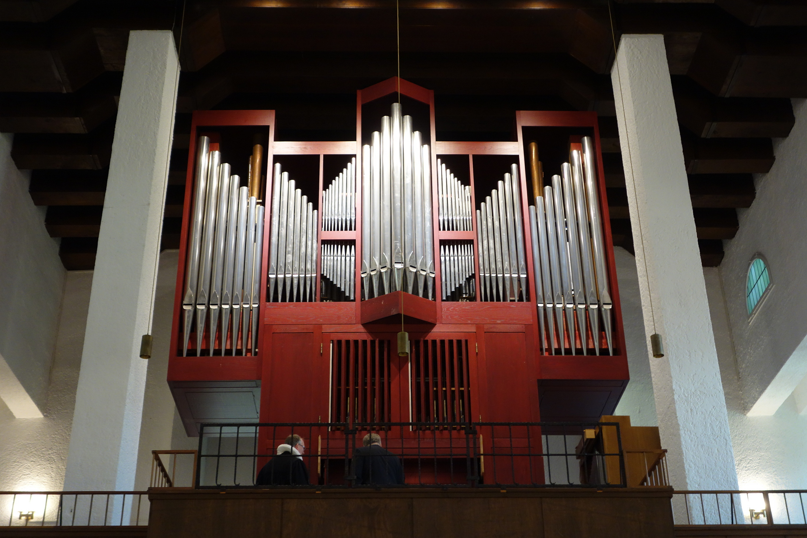 Orgel Lutherkirche Lübeck, Schleswig-Holstein, Deutschland